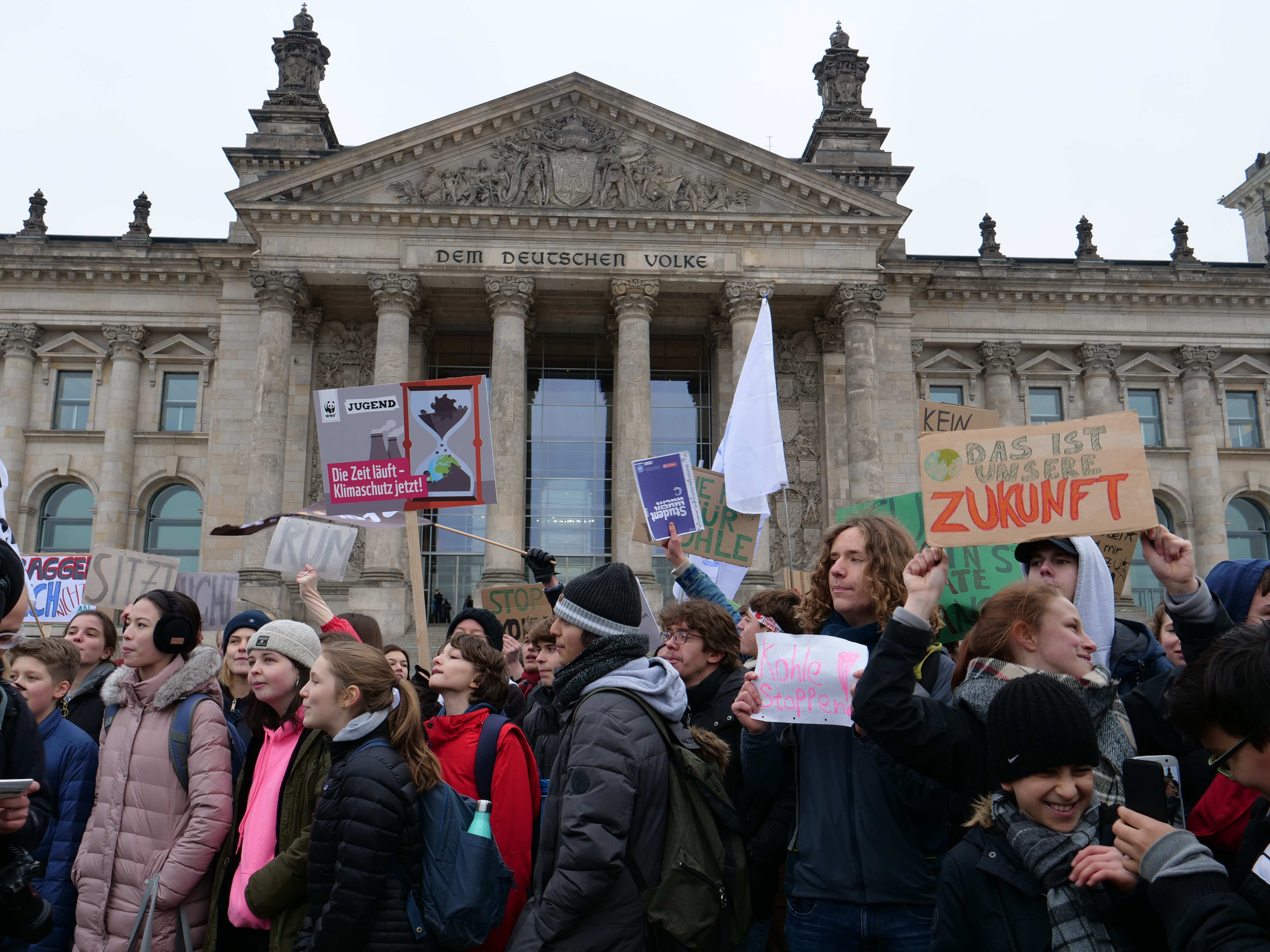 Unter dem Motto "#FridaysForFuture" und "Climate Strike!" streikten insbesondere Schülerinnen und Schüler vor dem Reichstagsgebäude in Berlin.